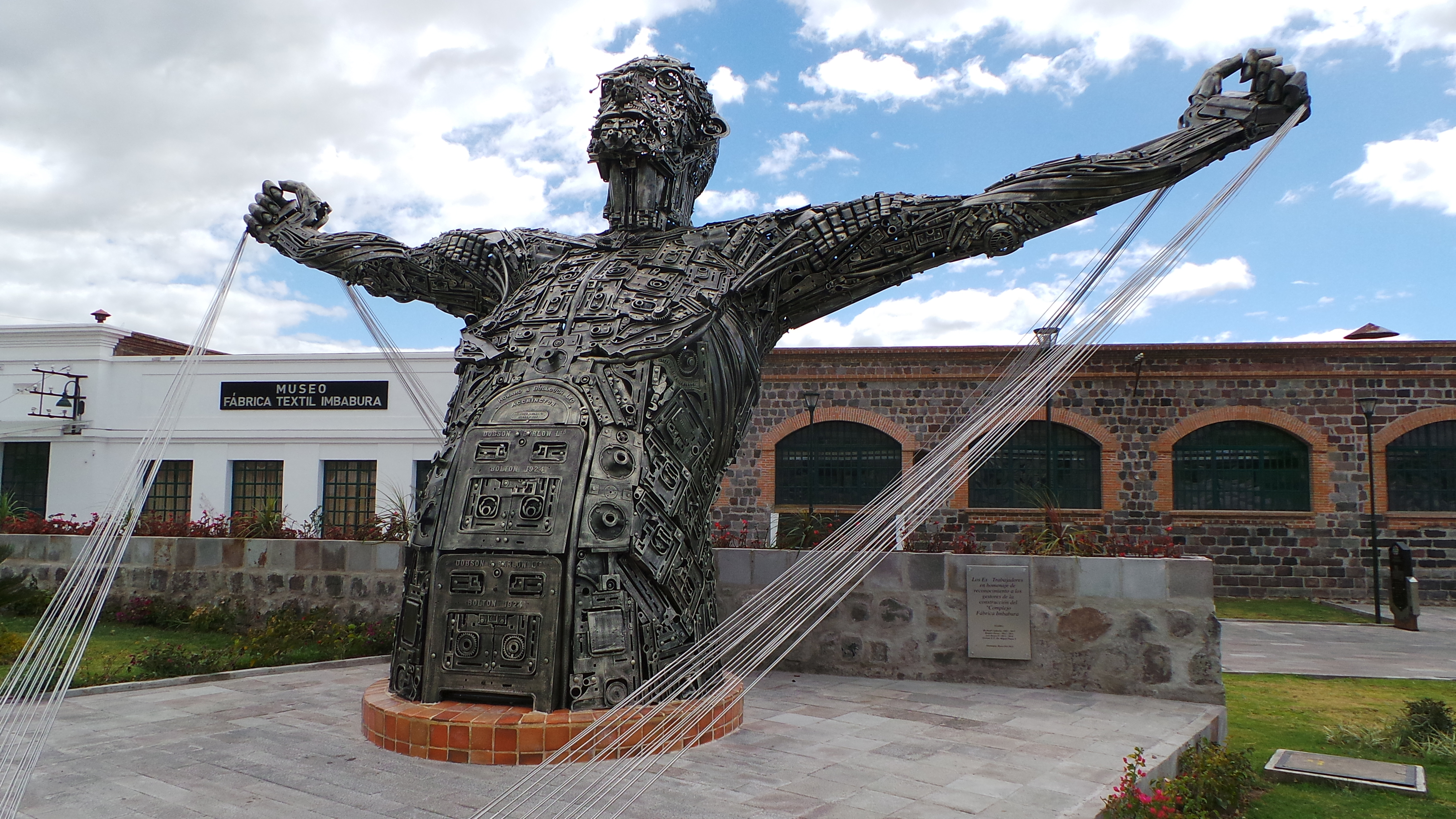 Recorrido ministra SM por provincia de Imbabura 29-07-2014 (17)